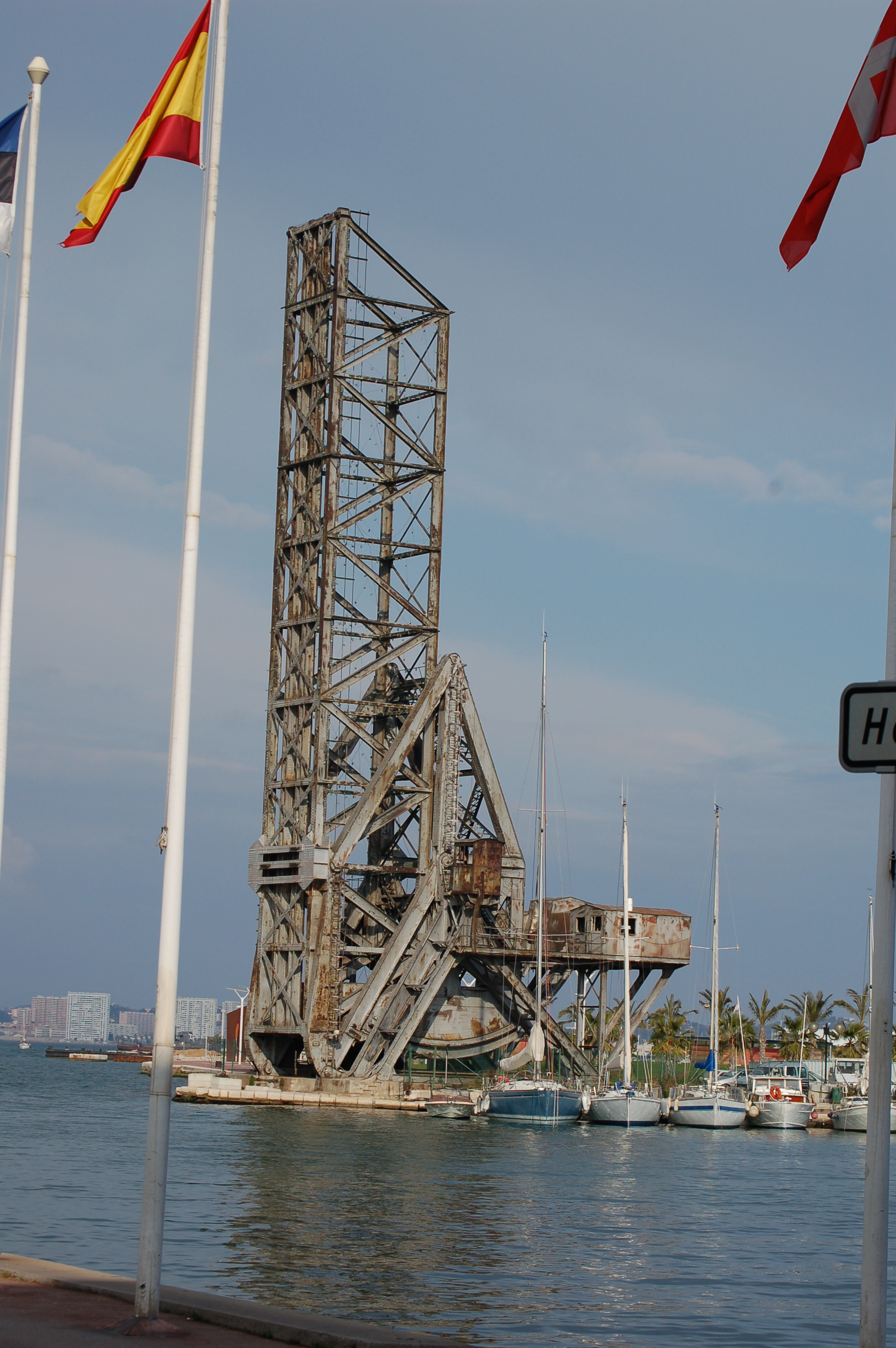 Pont levant de l'ancien chantier naval de la Seyne-sur-mer (Var - France) Avril 2007,ce dernier pourvut de rails,s'abaissait pour que les trains chargé de matières premières (acier,tôle,etc) puissent ravitailler les ateliers de forge et chaudronnerie.